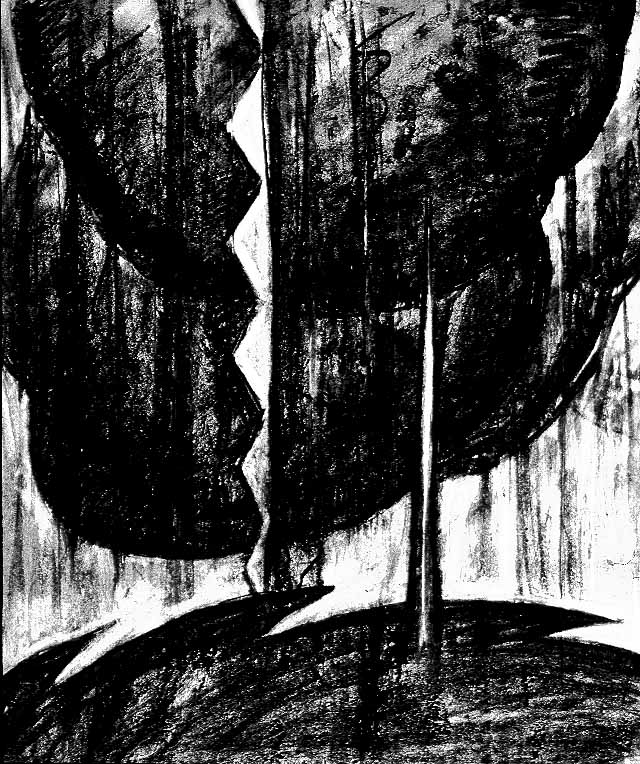 Title: Thunderstorm